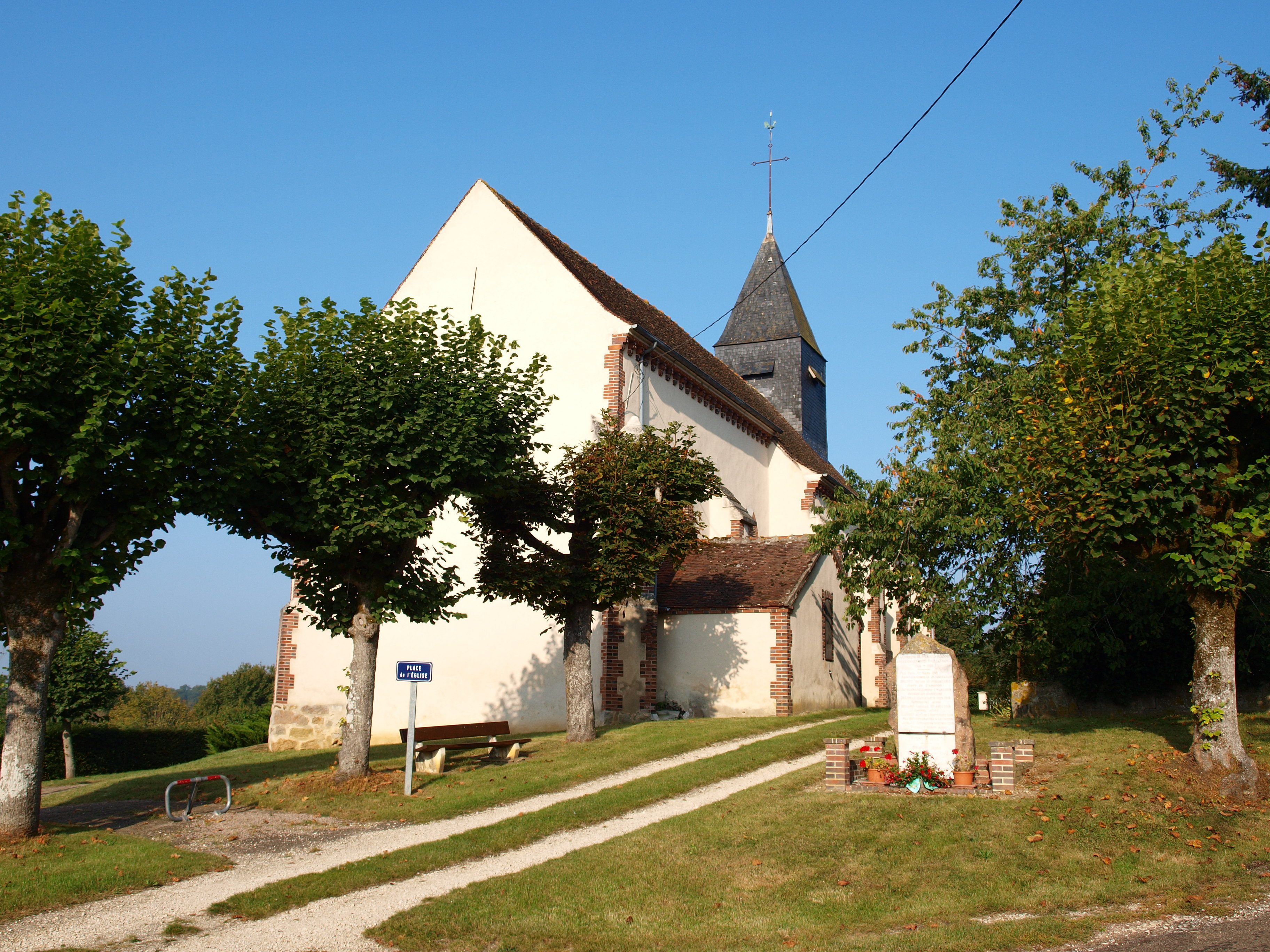 Saint-Denis-sur-Ouanne (Yonne, France) ; l'église